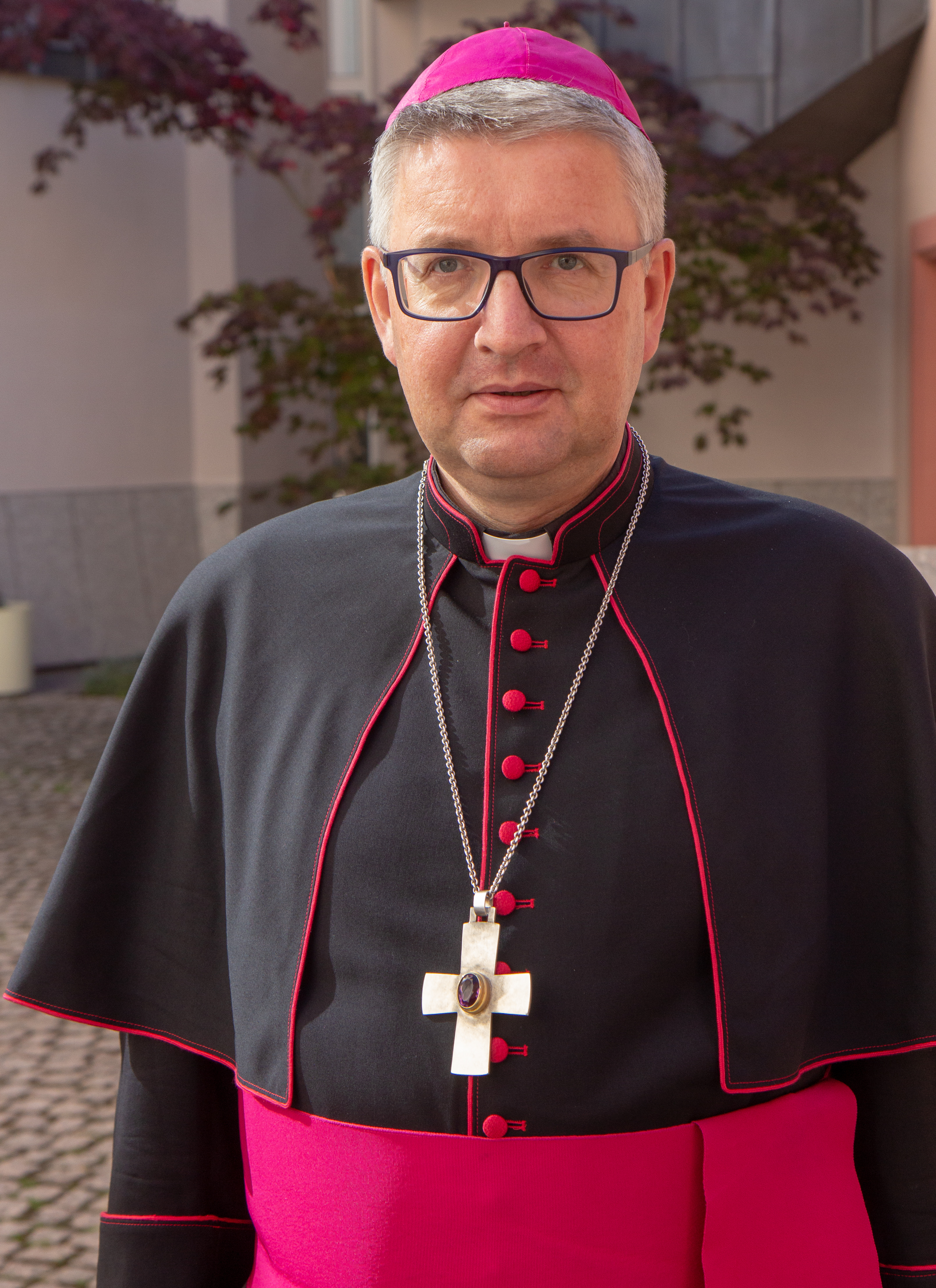 Vorstellung des Buches "Ohne Familie ist kein Staat zu machen" im Erbacher Hof in Mainz u.a. mit Paul Kirchhof, Sylvia Pantel, Christian Baldauf, Bischof Peter Kohlgraf, Prof. Jürgen Borchert, Mechthild Loehr und Karl-Heinz van Lier.